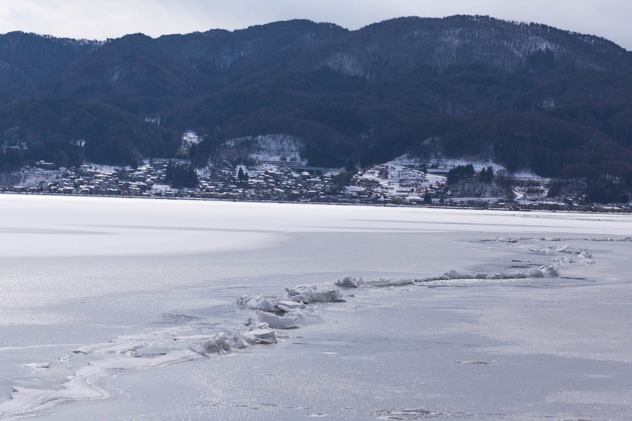 諏訪湖の「全面結氷」により、氷が寒暖差によりせり氷がせり上がる自然現象。 2018年に五季ぶりに出現す、これは一之御神渡り。